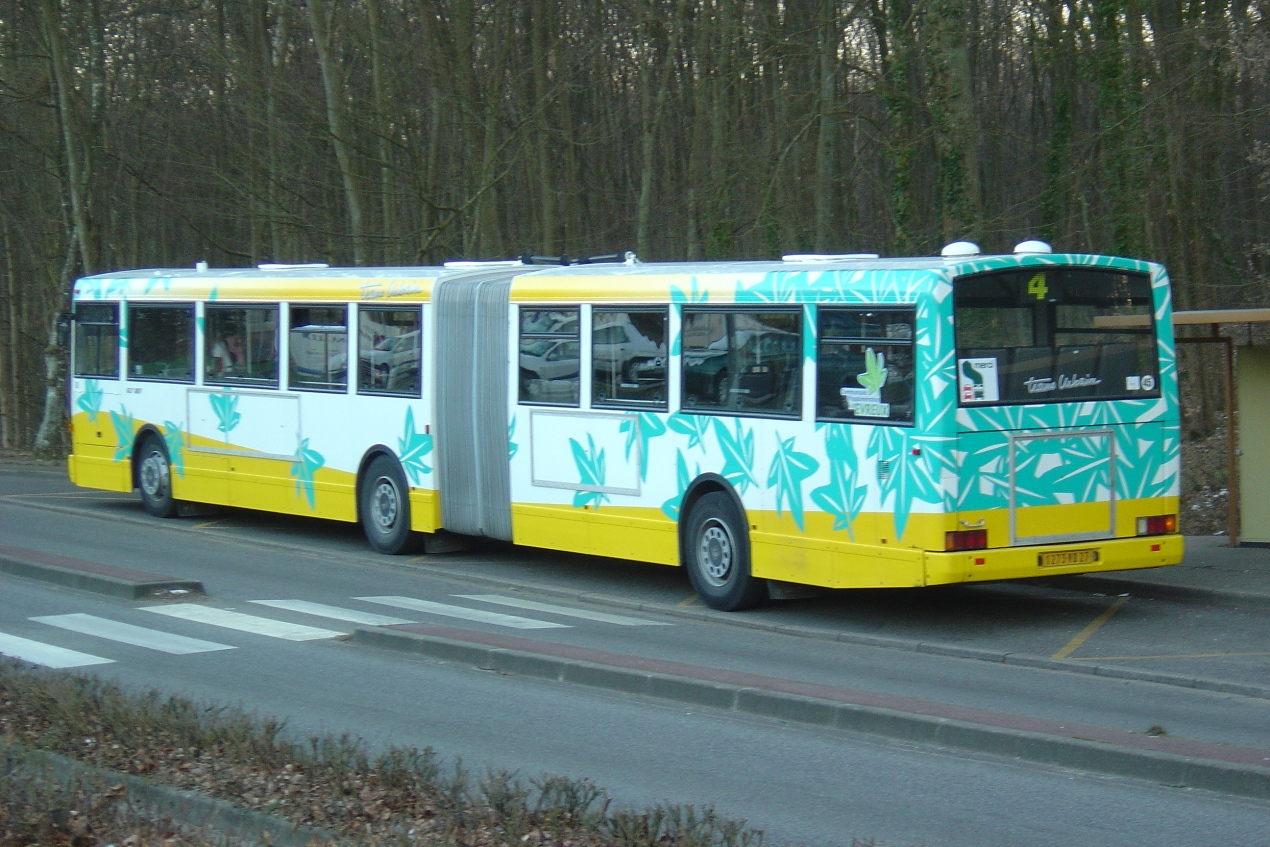 Autobus Heuliez GX 187 - Évreux - Bus articulé sur la ligne 4 du réseau géré par Trans Urbain, ici devant le lycée Senghor